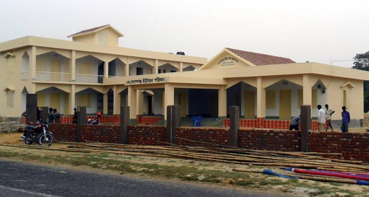 গোলাপগঞ্জ ইউনিয়ন বাংলাদেশের সিলেট জেলার গোলাপগঞ্জ উপজেলার অন্তর্গত একটি ইউনিয়ন।[১]। ১৯১৯ইং সালে বঙ্গিয় পল্লিয় সায়িত্ব শাসন আমলে চৌকিদারী পঞ্চায়েত বিলুপ্ত করে ইউনিয়ন পর্যায়ে ইউনিয়ন বোর্ড গঠন করা হয়। ১৯৬০ইং সনে গোলাপগঞ্জ ইউনিয়ন কাউনন্সিল। ১৯৭৩ইং সনে গোলাপগঞ্জ ইউনিয়ন পরিষদ।